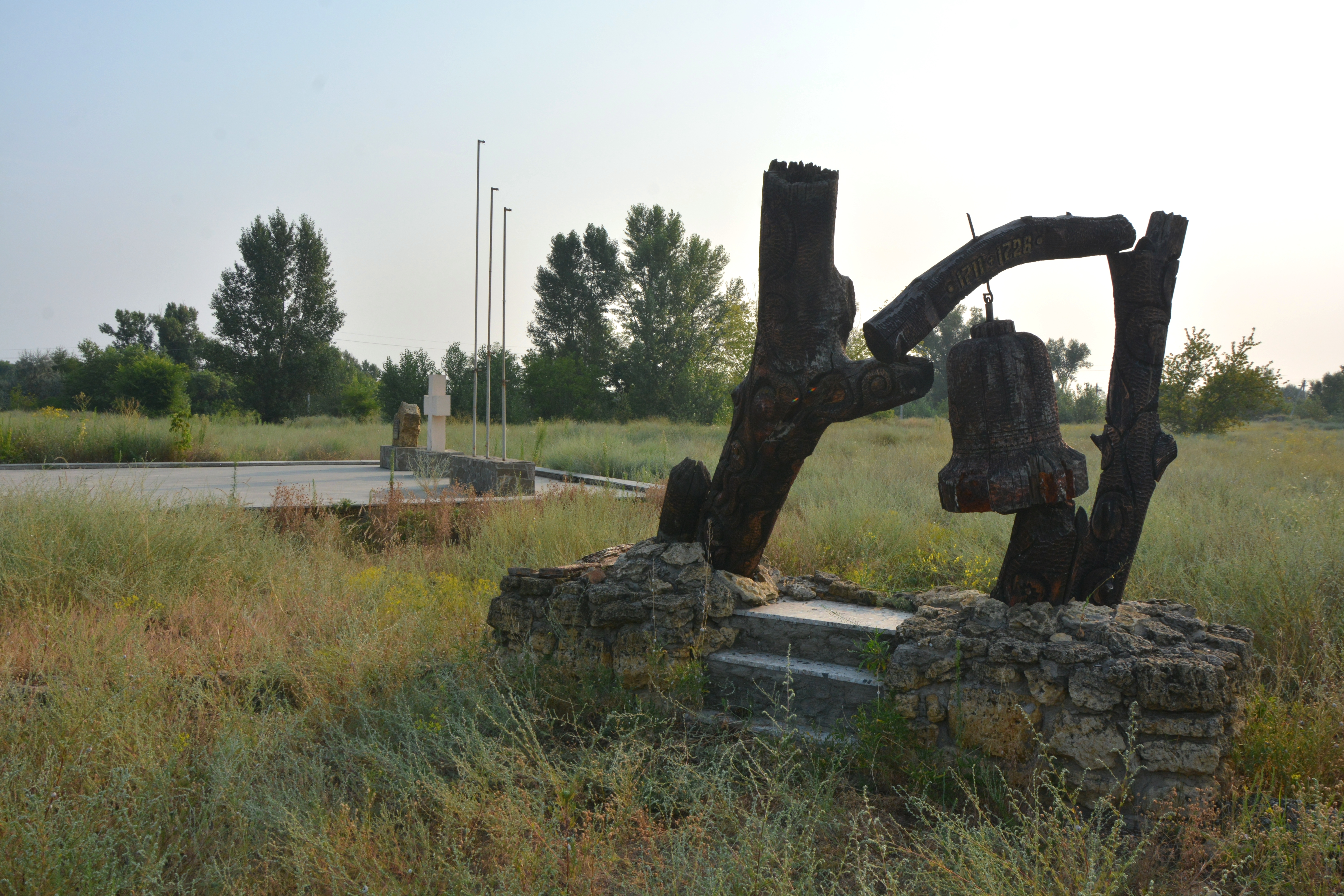 Олешківська Запорізька Січ, М. Цюрупинськ